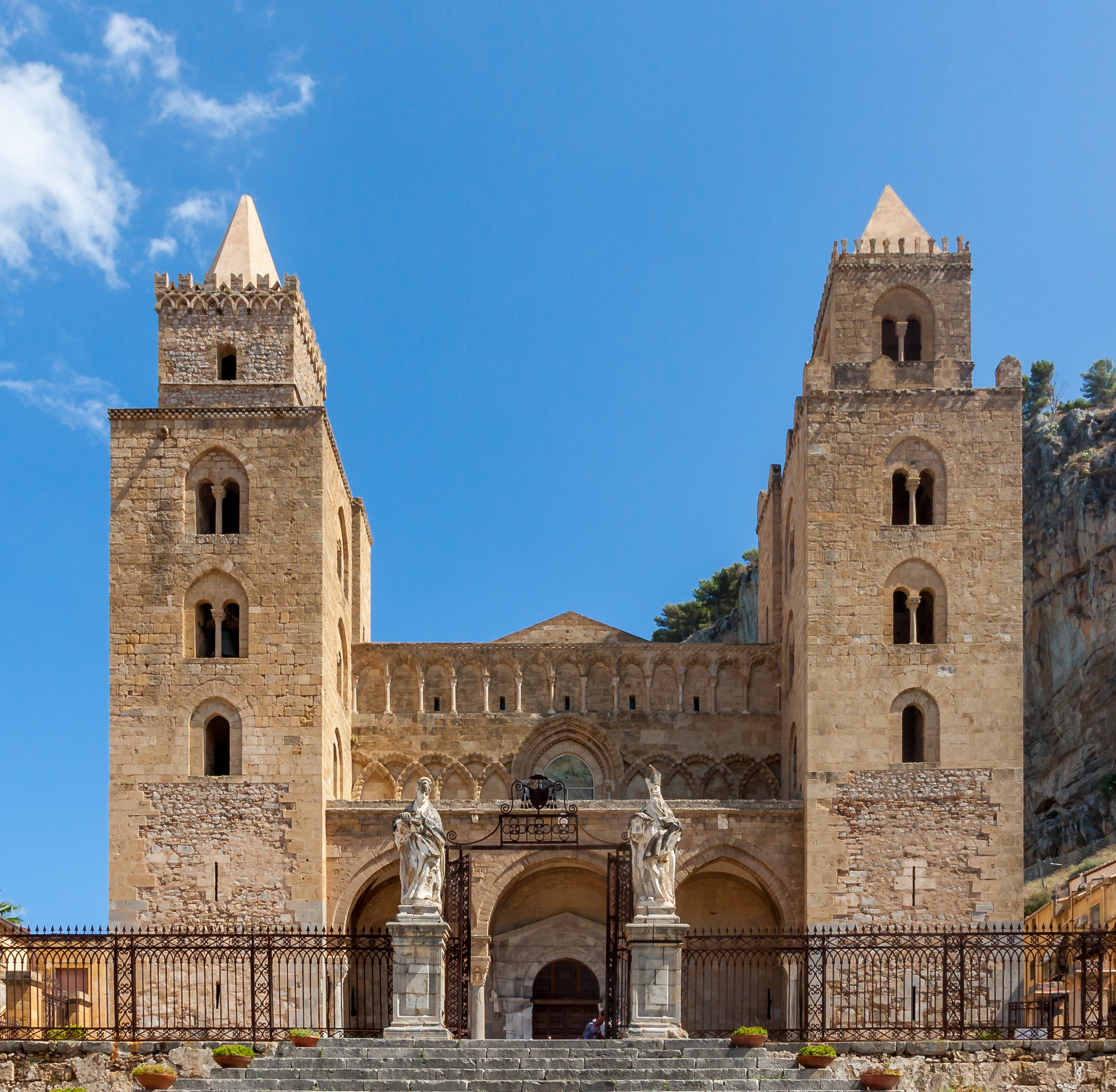 Der Dom von Cefalu